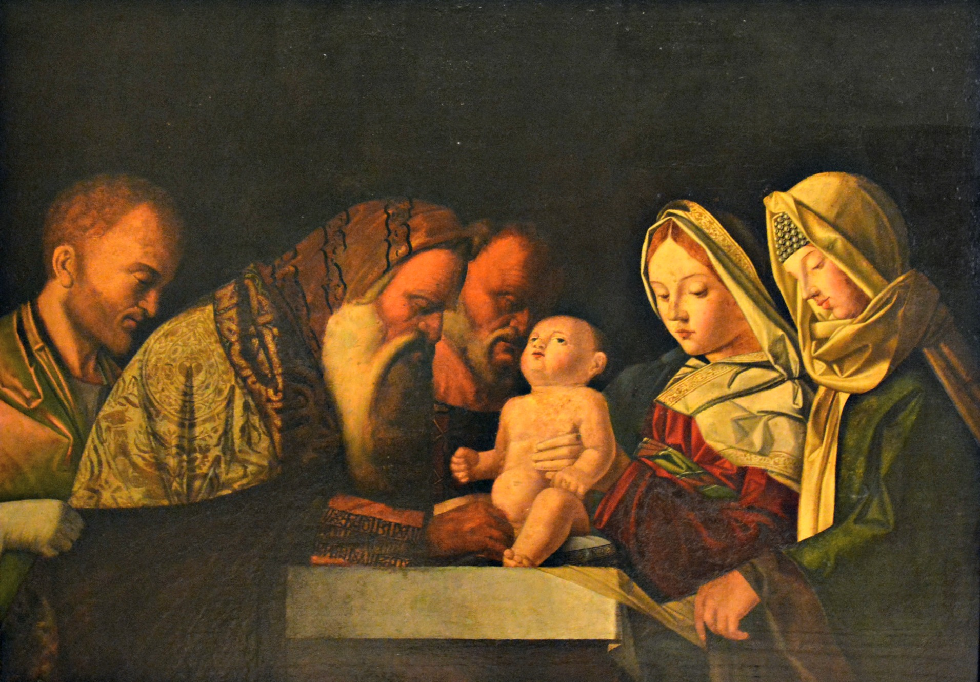 Vedi titolo